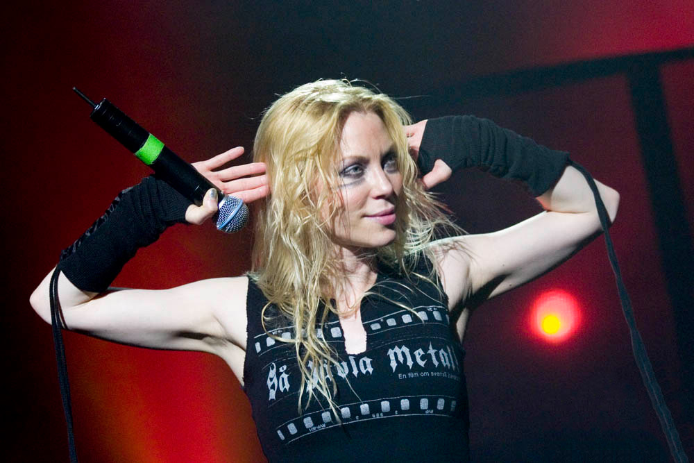 Angela Gossow from Arch Enemy, Via Funchal - São Paulo, Brasil